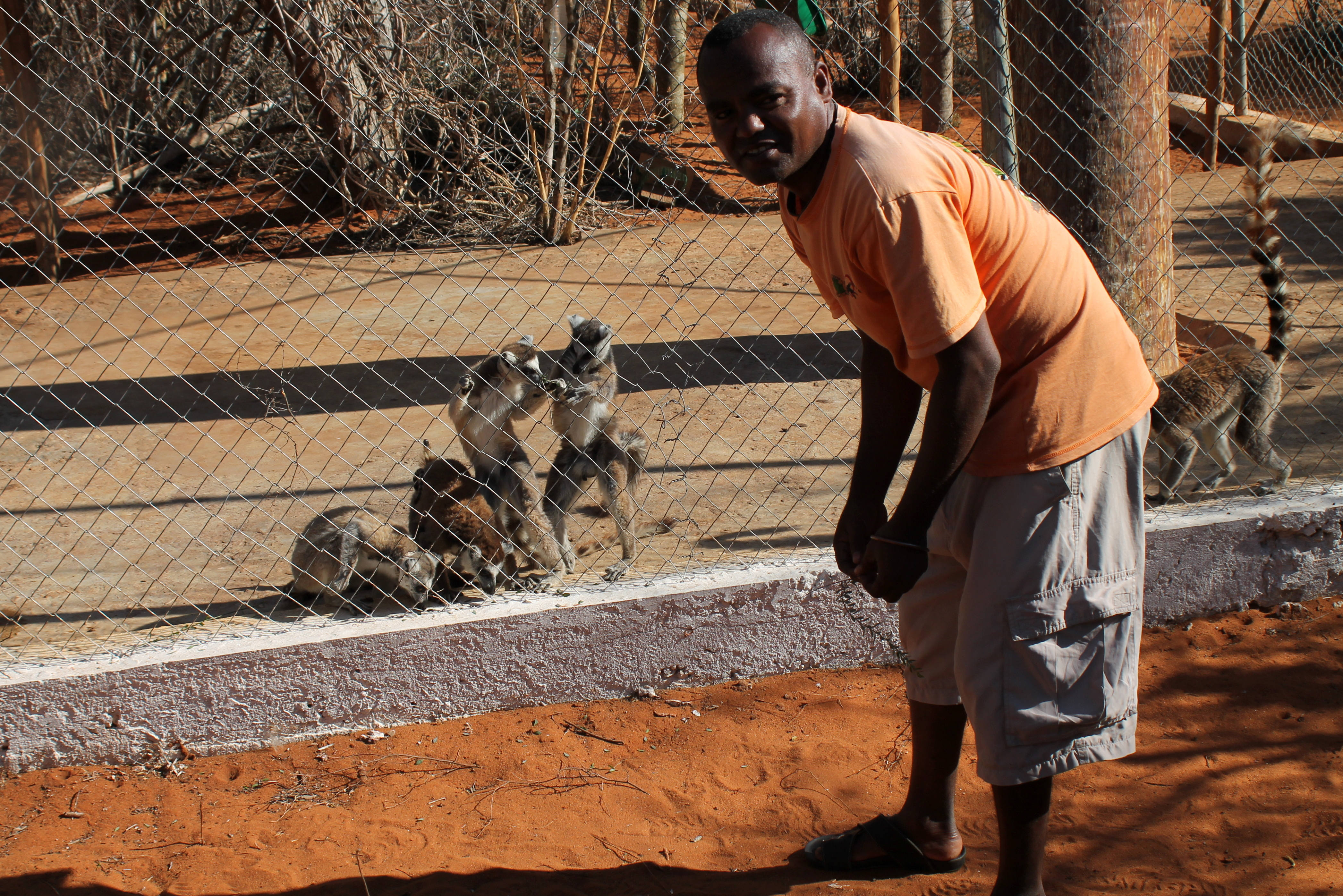 Lemur Rescue Center in Reniala